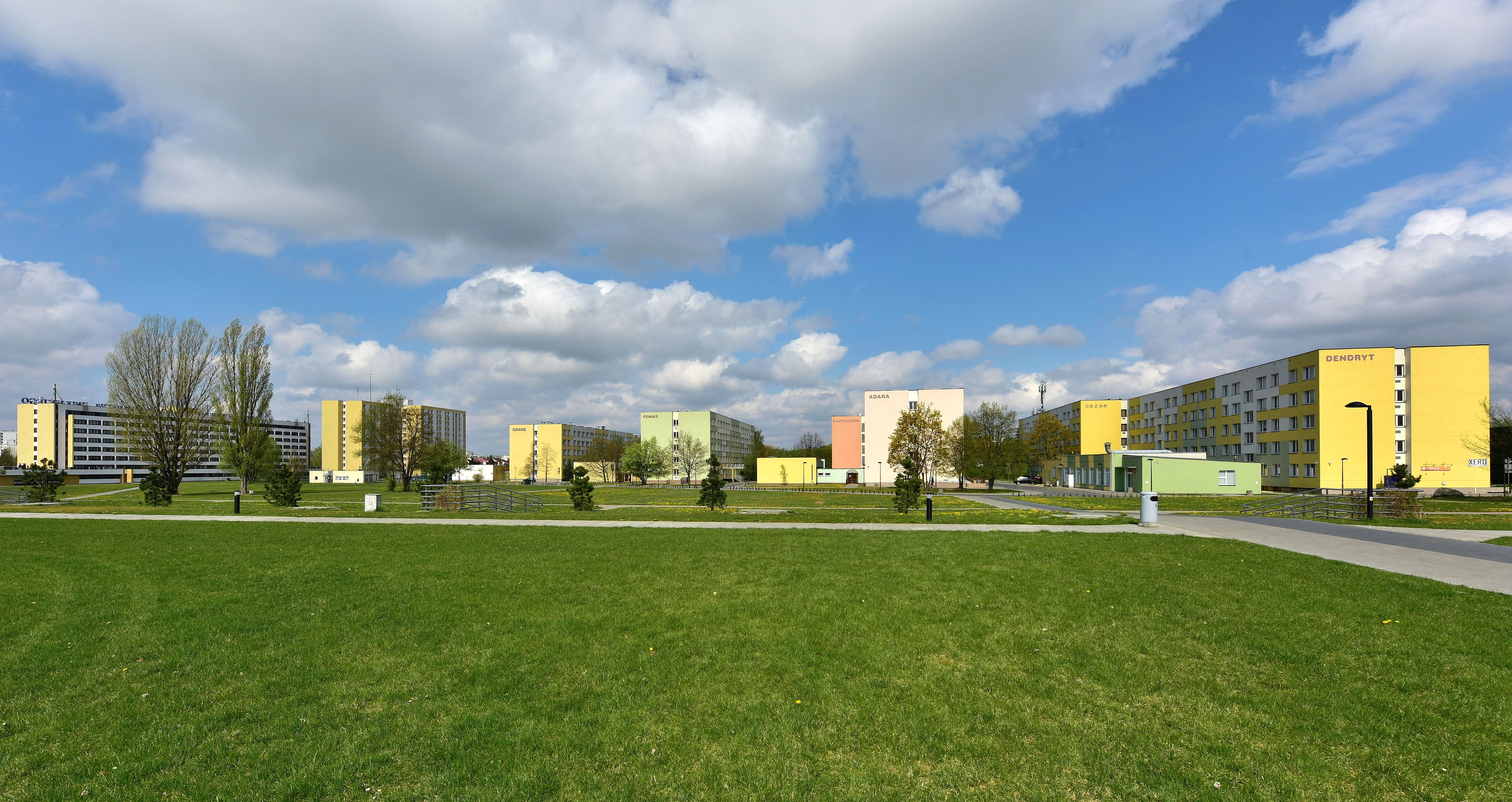 Kompleks domów studenckich SGGW przy ul. Nowoursynowskiej w Warszawie